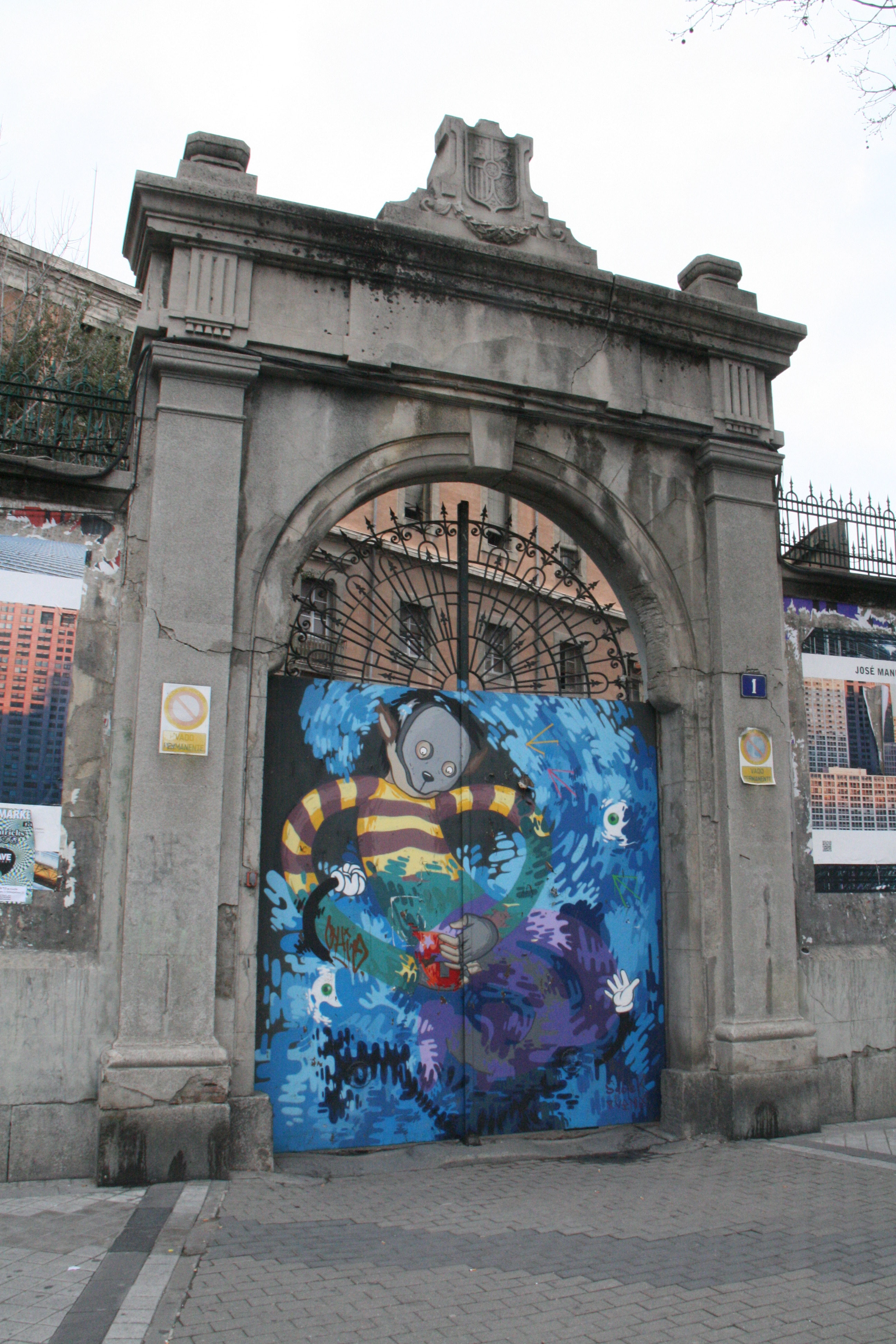 Puerta de la Fábrica de Tabacos - Madrid